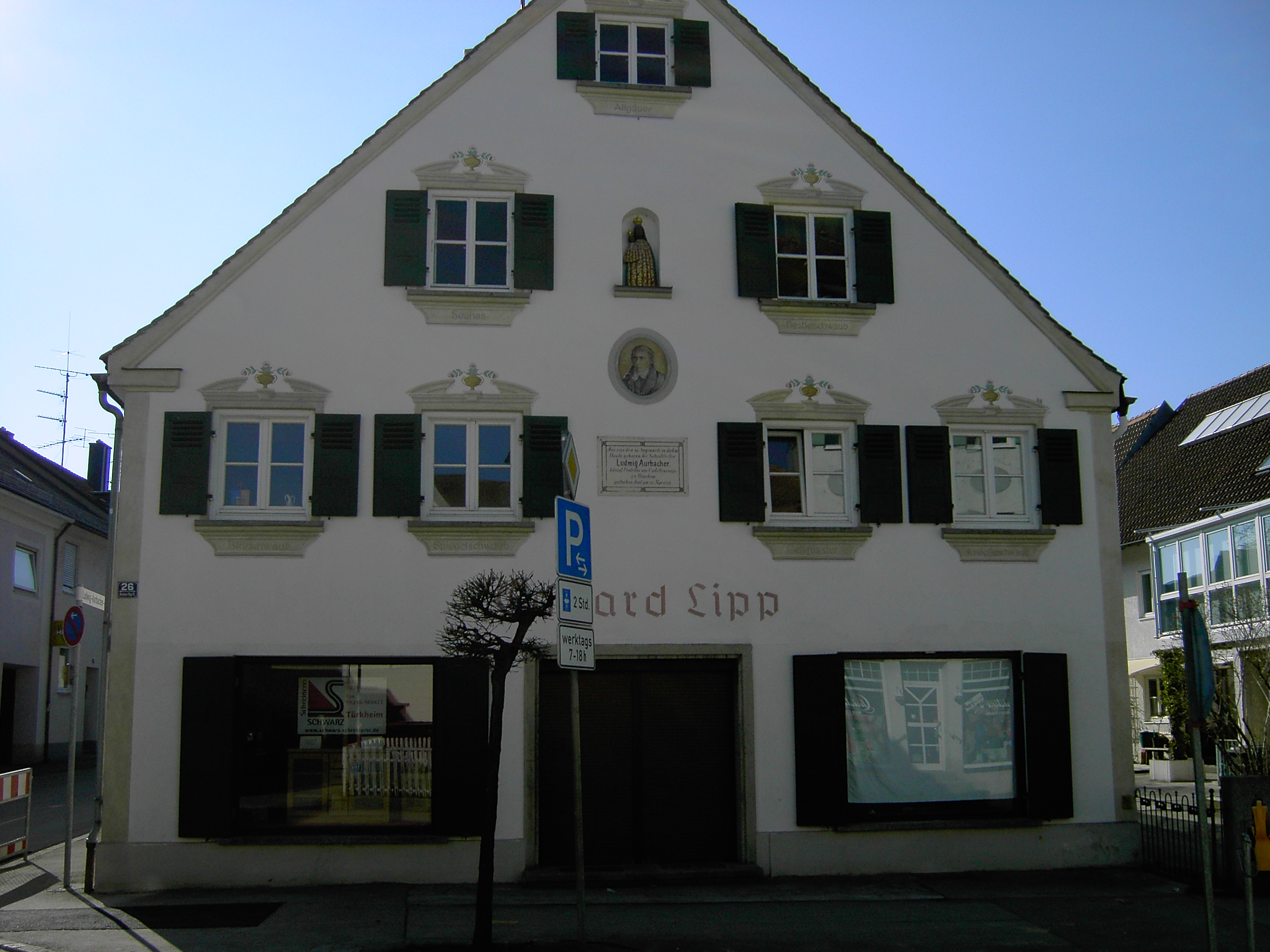 Das Ludwig-Aurbacher-Haus in Türkheim